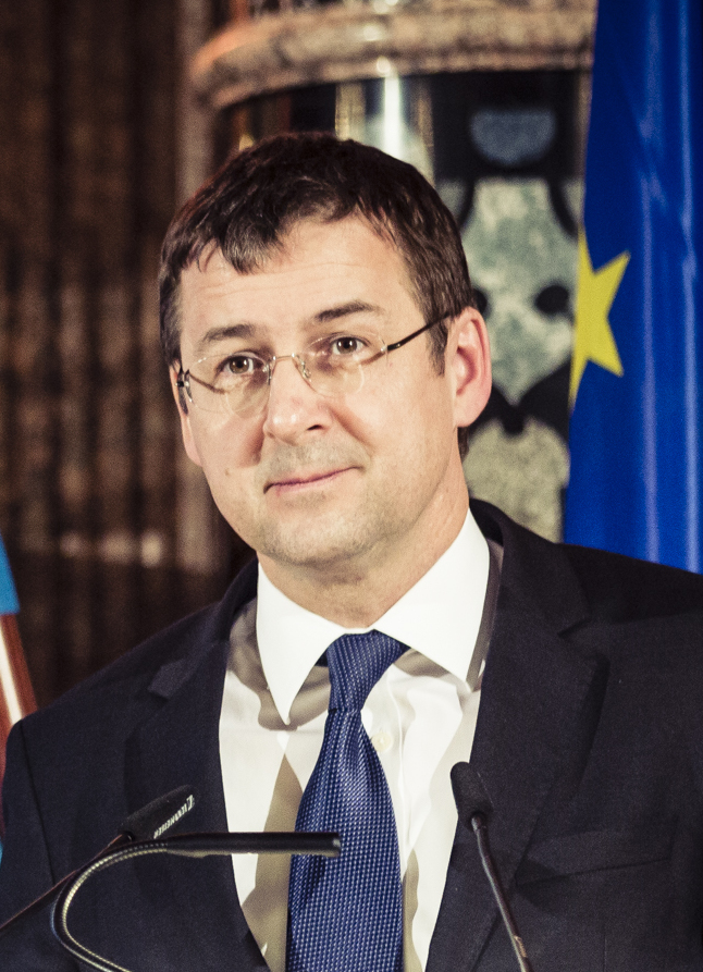 David Gill während der Münchner Sicherheitskonferenz 2017